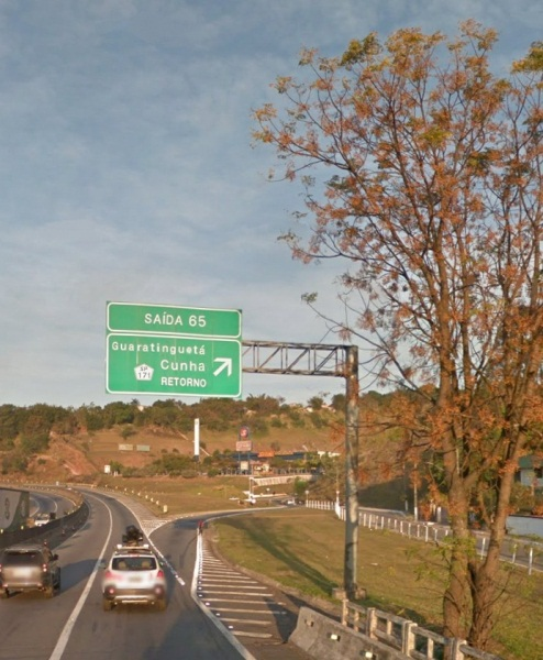 Indicação rodoviária da 'saída 65' da Rodovia Presidente Dutra, Estado de São Paulo, Brasil